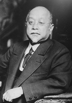 Japanese diplomat Ichirō Motono (1862-1918)